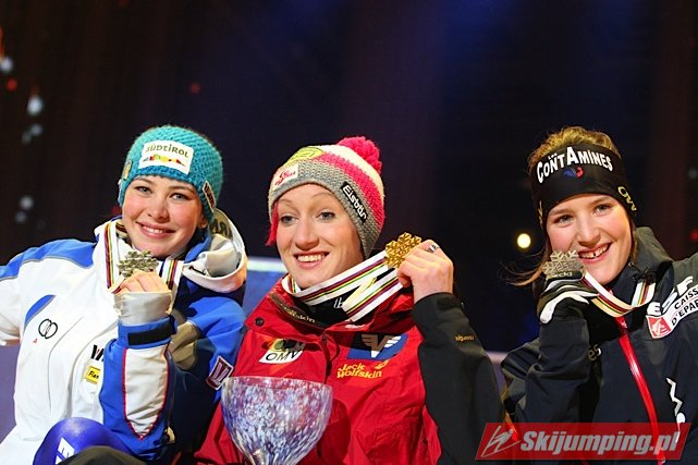 Elena Runggaldier, Daniela Iraschko i Coline Mattel podczas ceremonii medalowej po konkursie kobiet na Mistrzostwach Świata w Narciarstwie Klasycznym 2011 w Oslo.